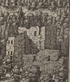 Digitalisierung: Seiten 13&14: Ausschnitt fuggerau